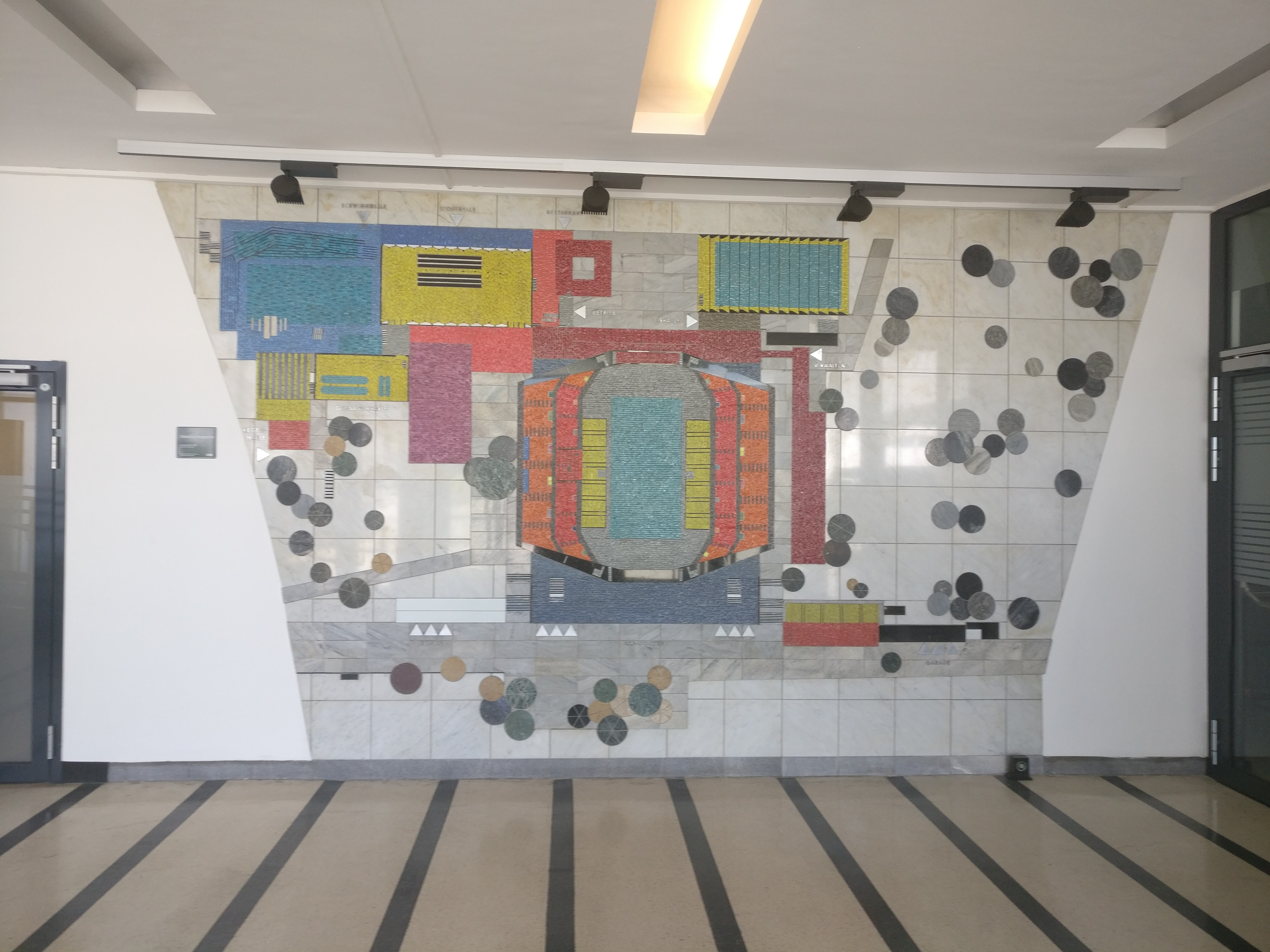 Mosaik "Orientierungsplan"